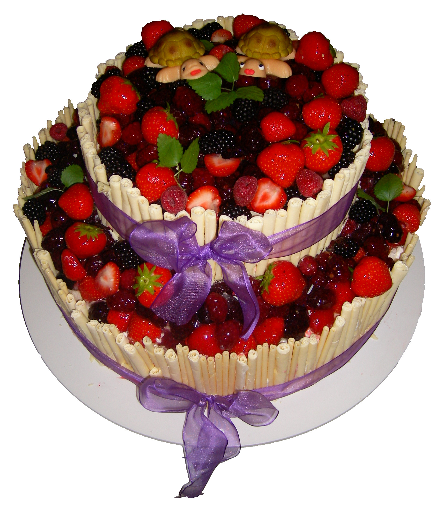 Tschechische Hochzeitstorte